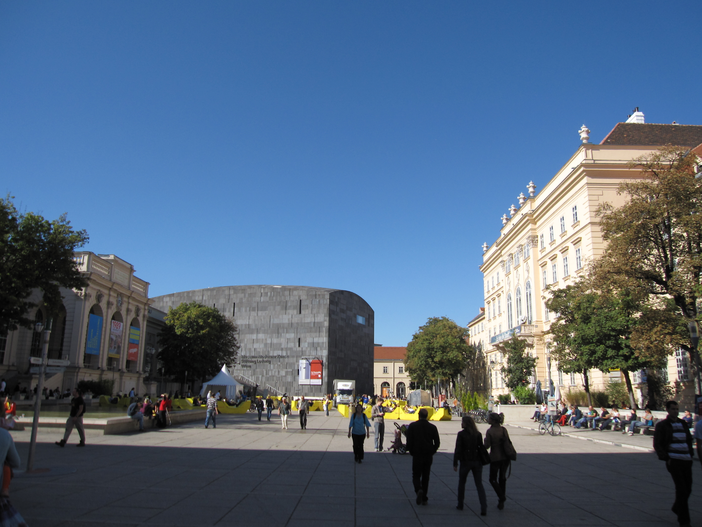 MuseumsQuartier